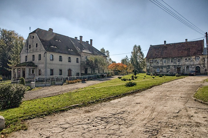 Pałac w Miedzianej